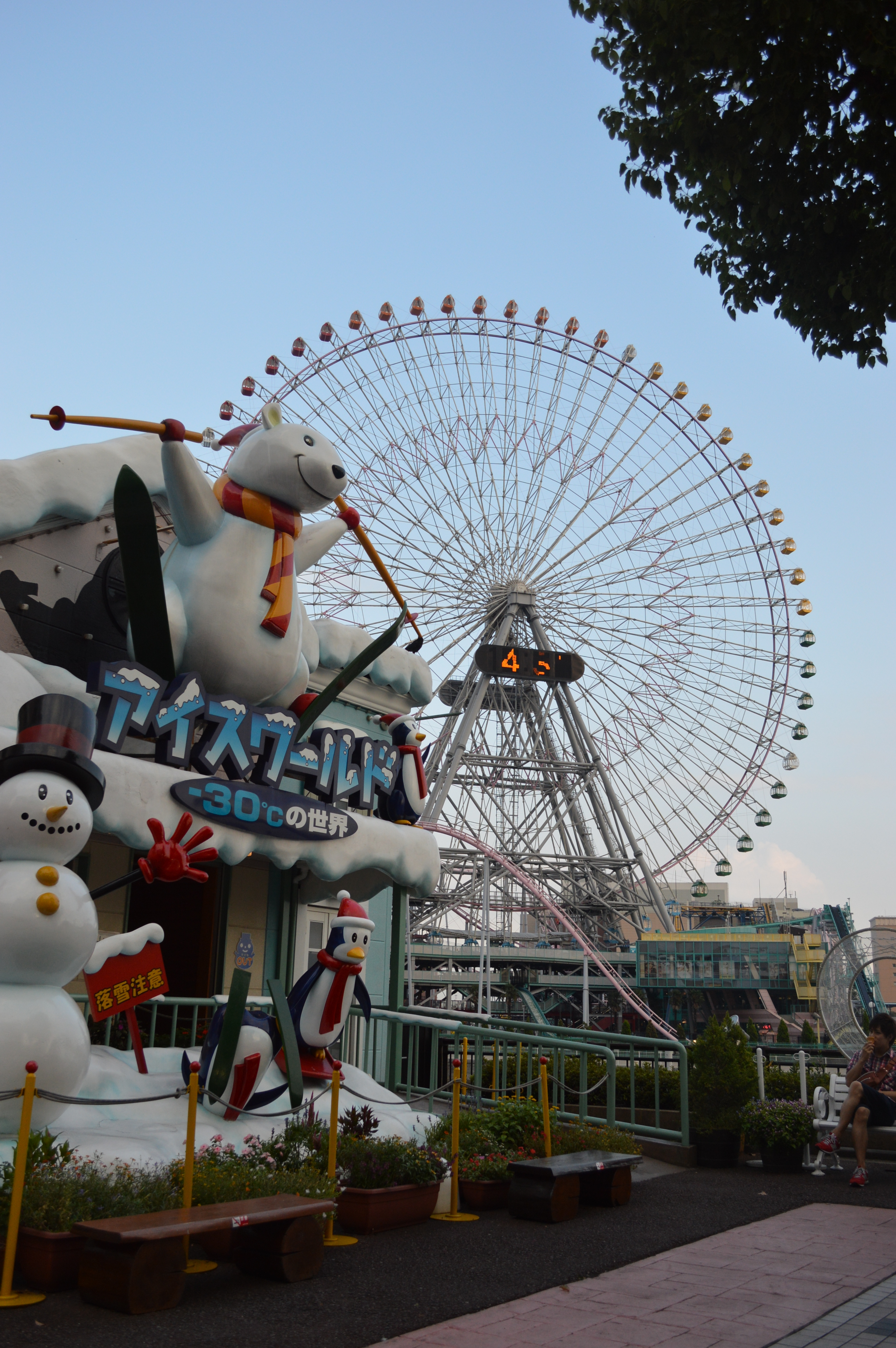 横浜コスモワールドのアイスワールドと観覧車